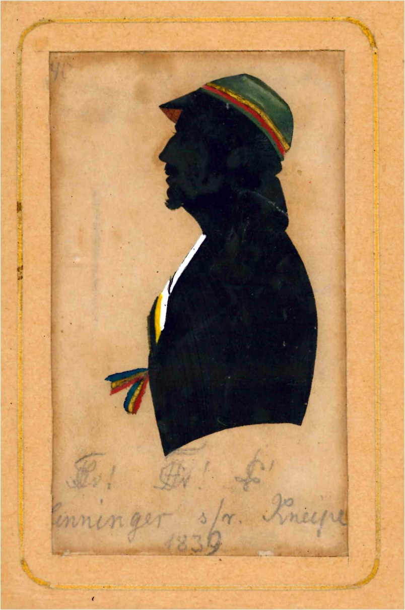 Schattenriss des Studenten Friedrich Wilhelm Henninger